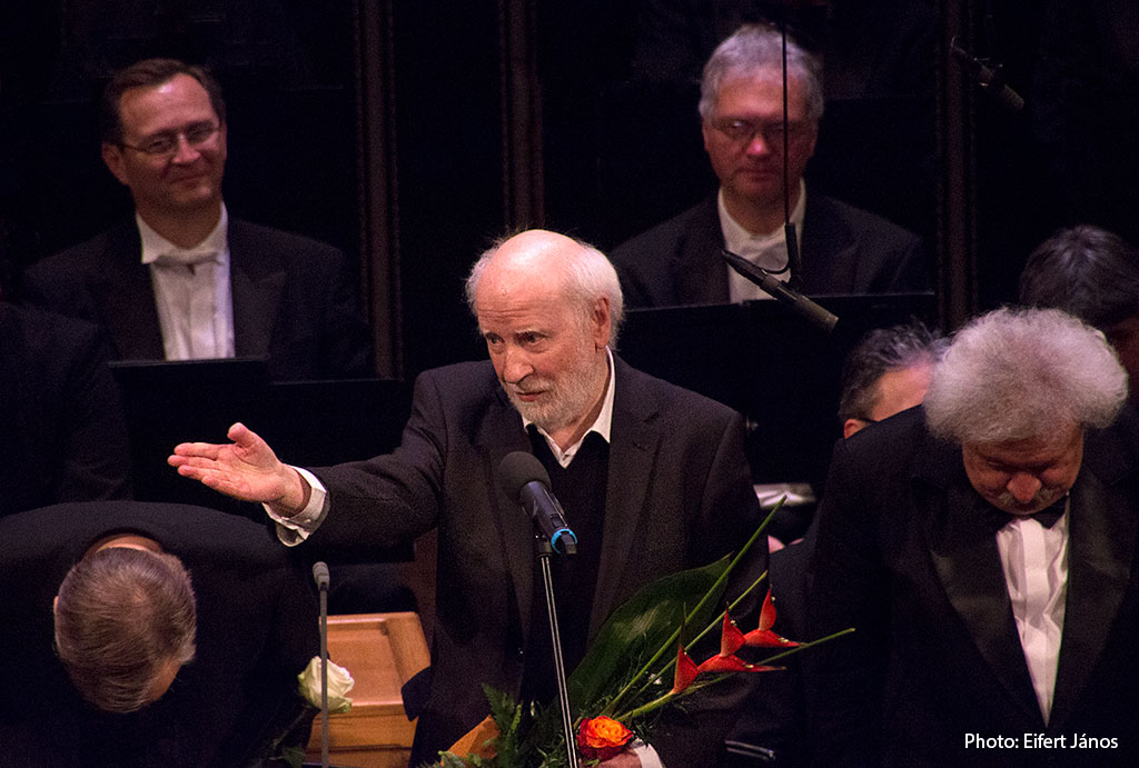 Jeney Zoltán (Szolnok, 1943. március 4. –) Kossuth- és Erkel Ferenc-díjas magyar zeneszerző, érdemes művész.